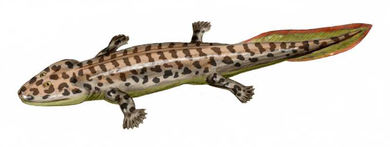 Acanthostega gunnari, pencil drawing, digital coloring